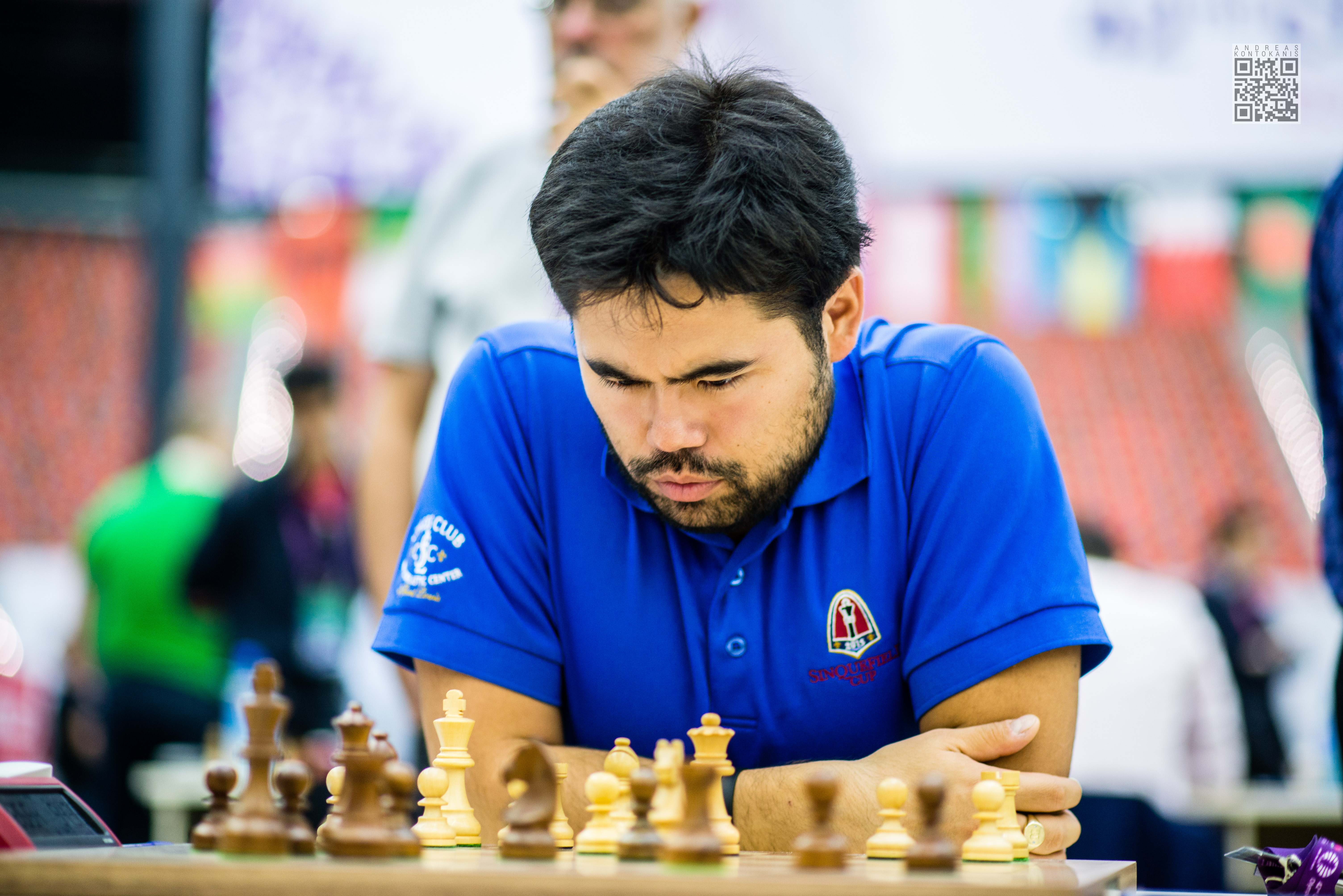 Nakamura Hikaru with blue t-shirt